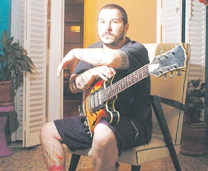 Foto de Ariel Minimal